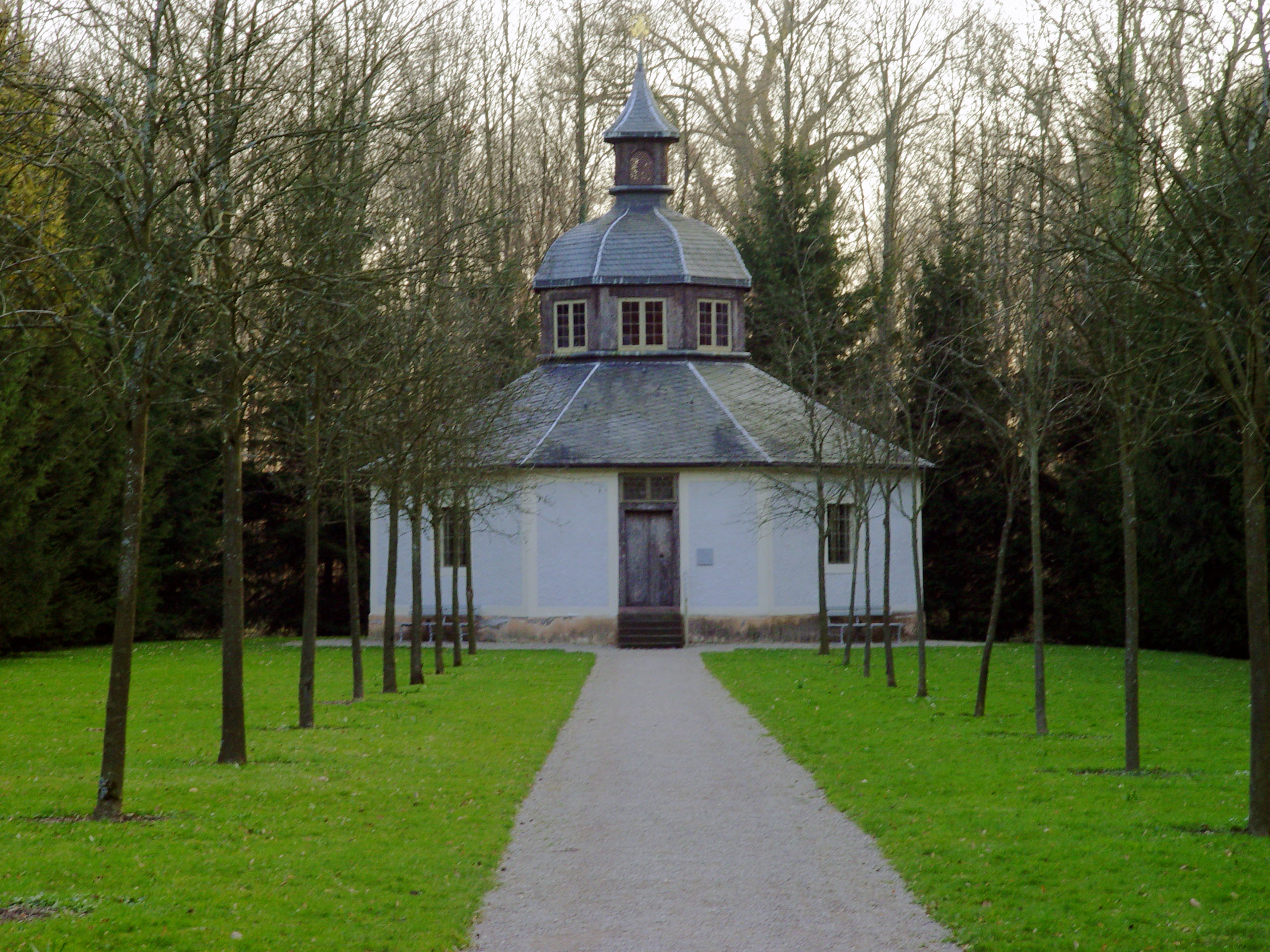 Fotografiert von Martin Dürrschnabel. Eremitage im Schloss Favorite in Rastatt.